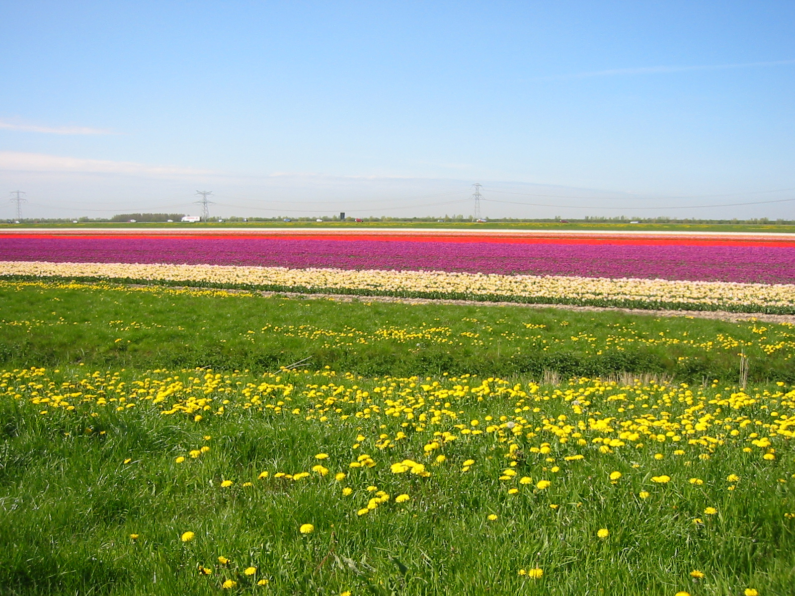 Eigen foto